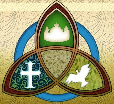 خدا یگانه است خدای یگانه خود را همواره به سه طریق بر انسان ها آشکار می کند